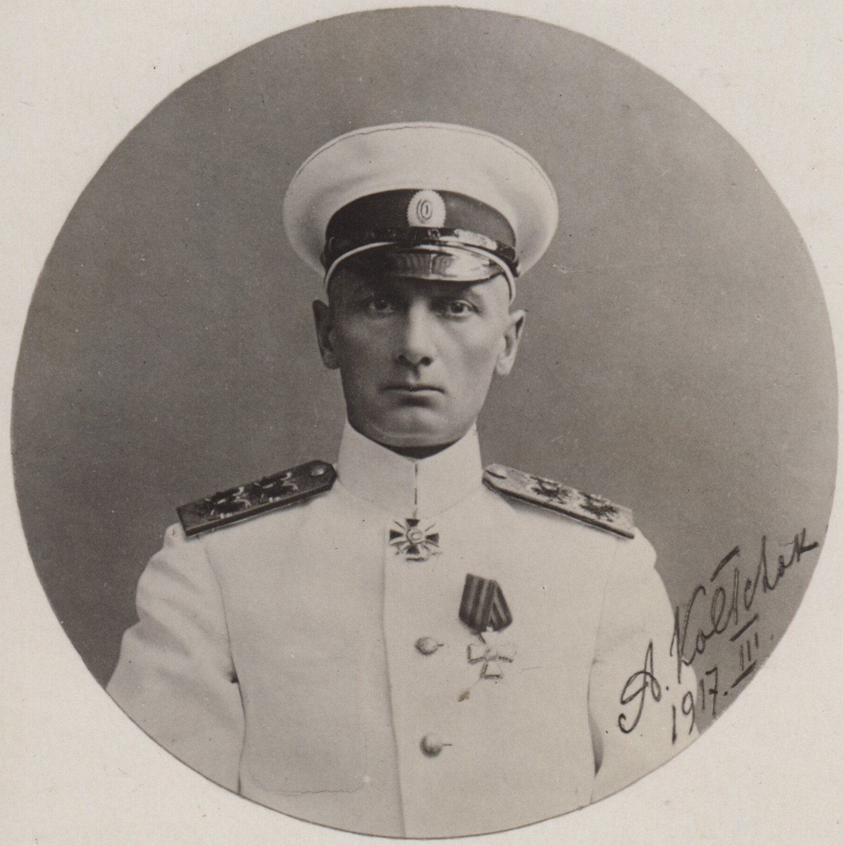 Командующий Черноморским флотом вице-адмирал А.В. Колчак. 1916 г.